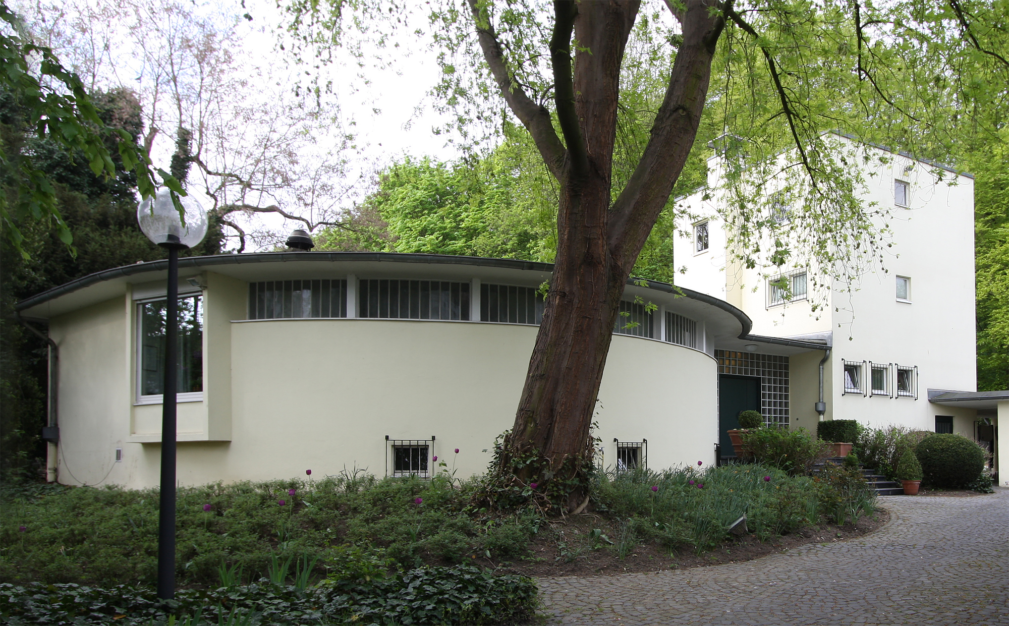 Ehemaliges Wohnhaus von Kunstsammler Josef Haubrich, erbaut 1951 von Wilhelm Riphahn